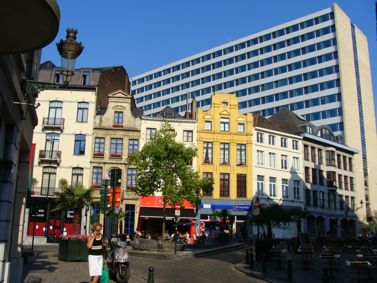 Oud en Nieuw